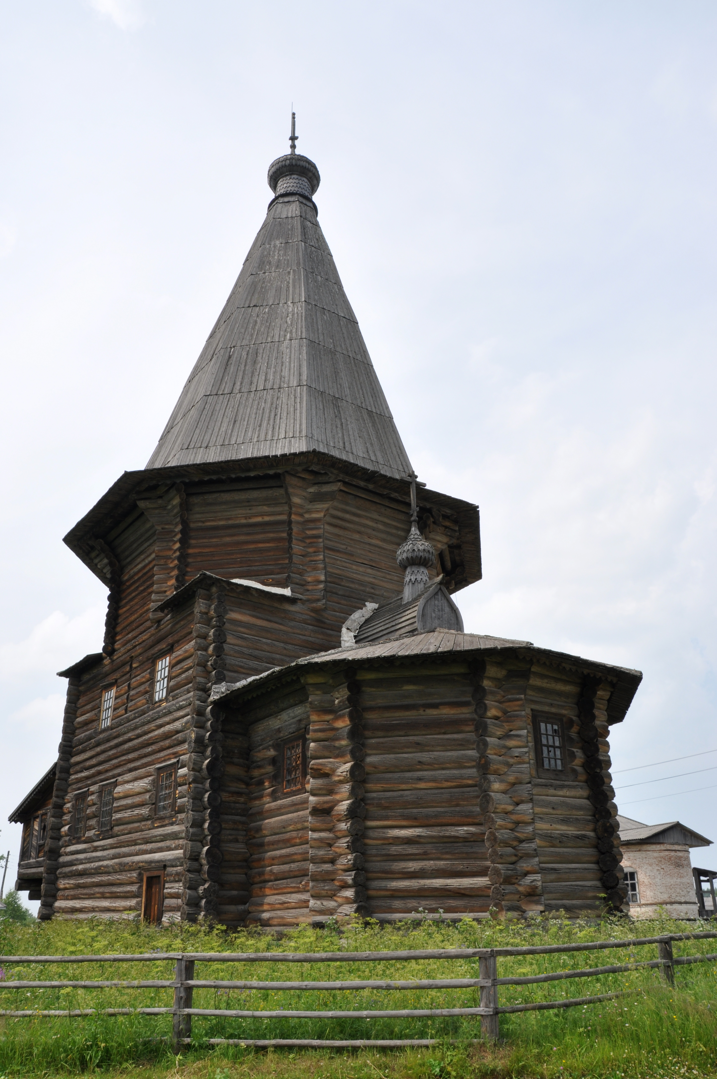 Церковь Дмитрия Солунского в Верхней Уфтюге. Вид с востока